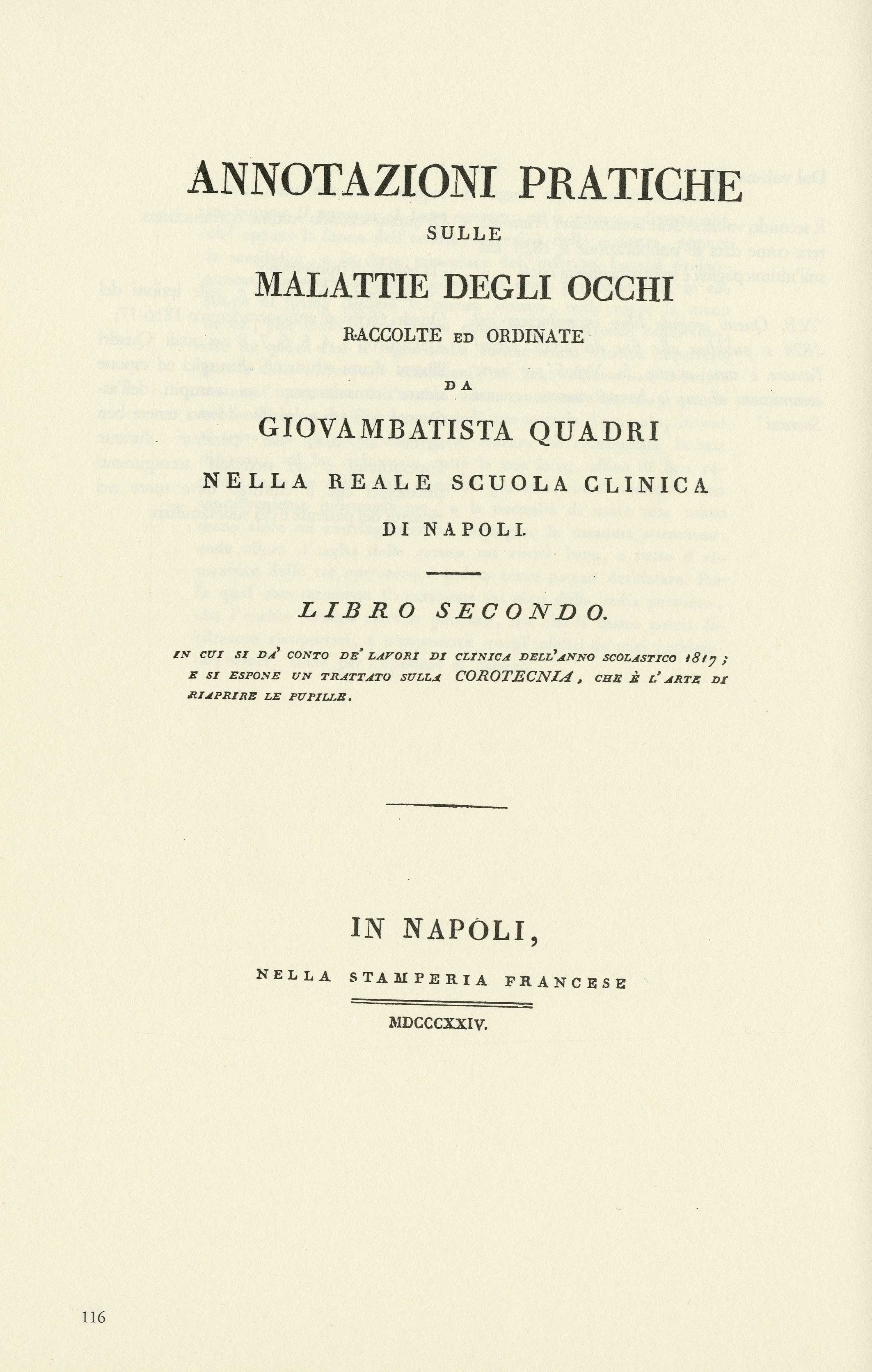 Frontespizio del II volume di "Annotazioni pratiche sulle malattie degli occhi" di Giovanni Battista Quadri